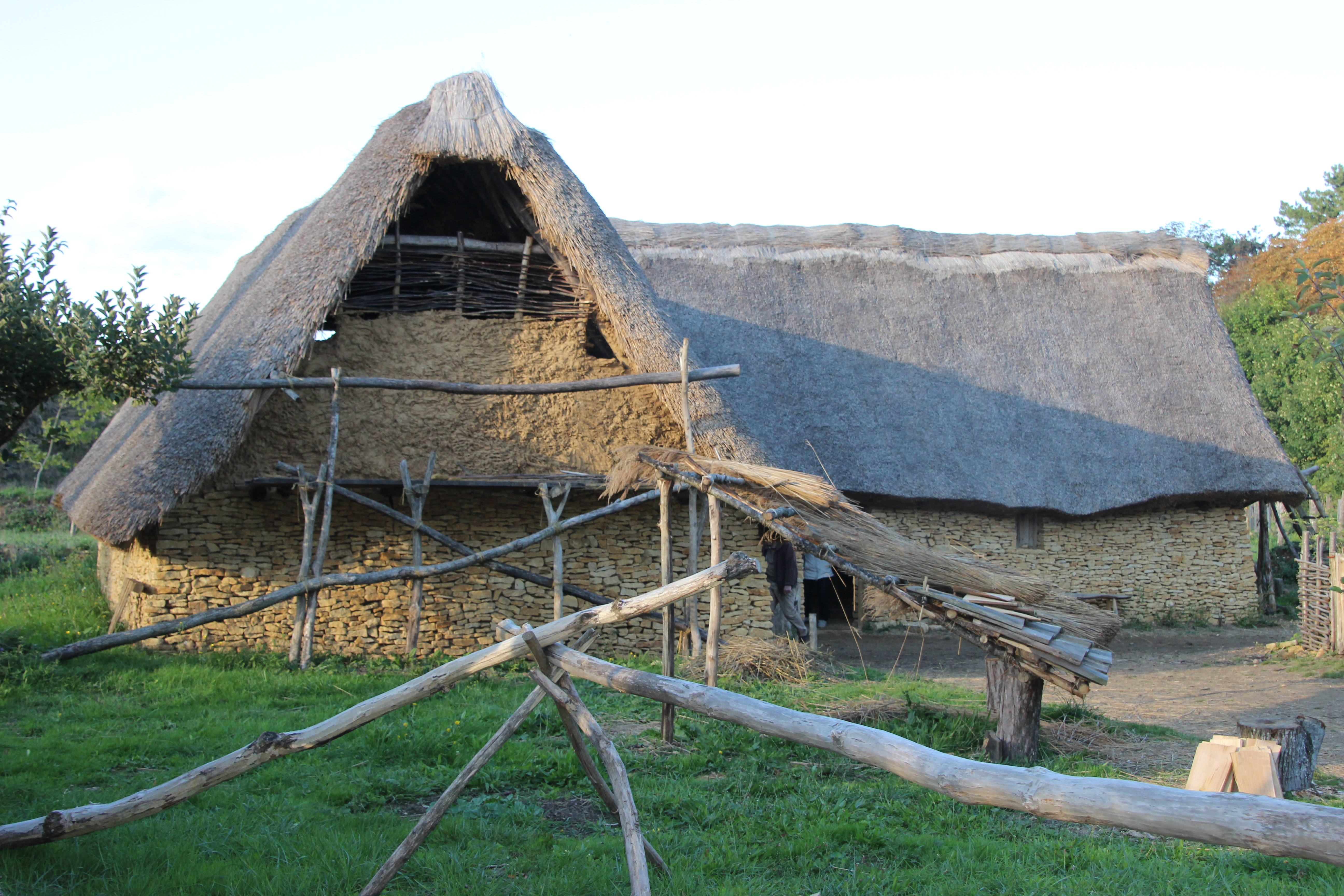 Ferme carolingienne de Vieux la Romaine en reconstitution au parc Ornavik - Septembre 2017 (#100wikicommonsdays r 2 jour 60)